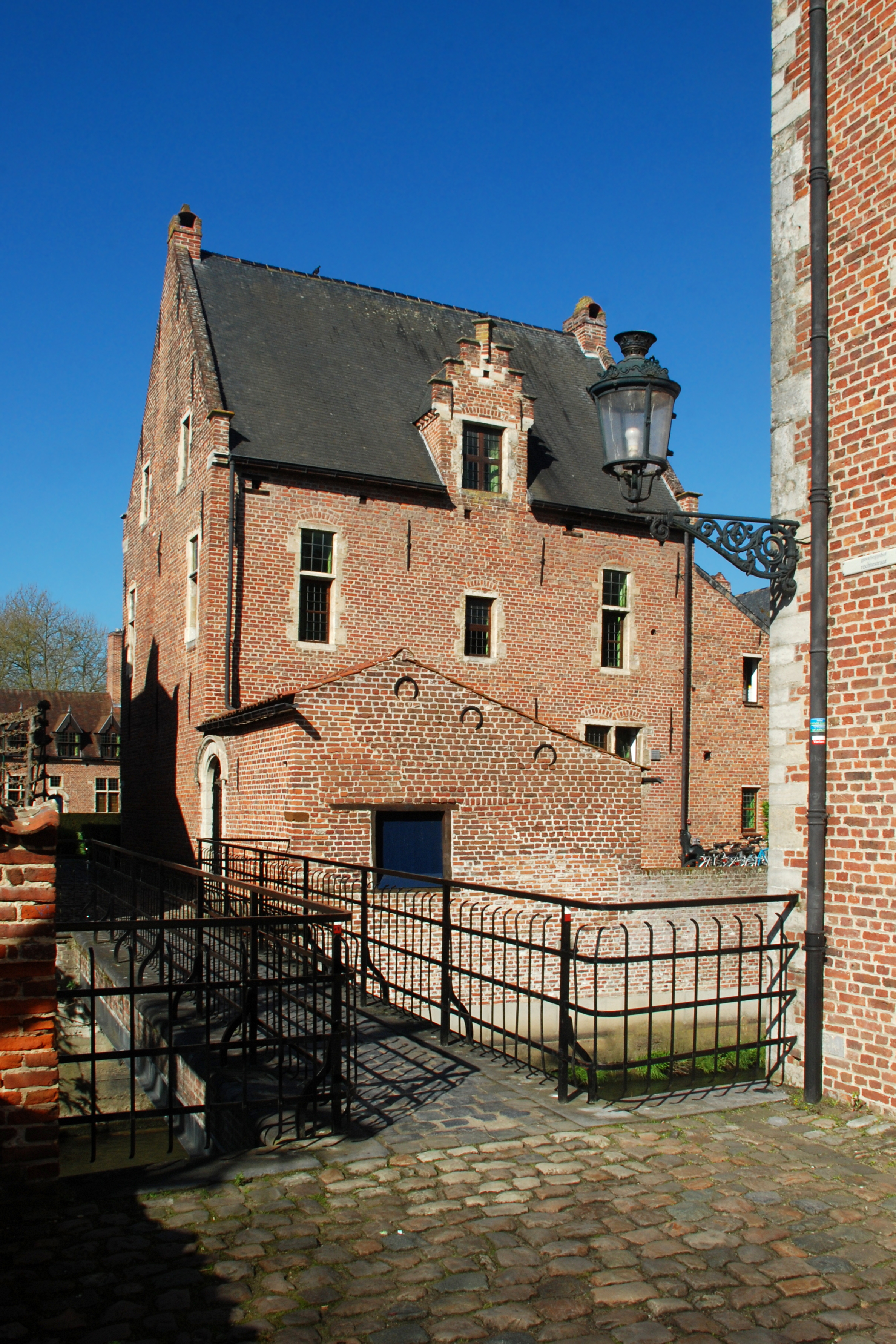 Belgium - Leuven - Groot Begijnhof